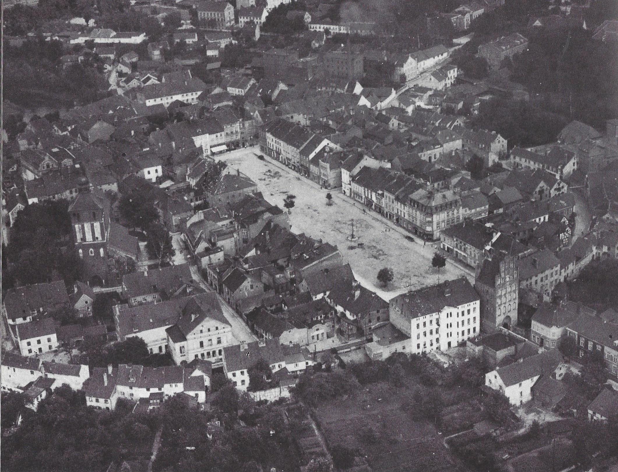 Luftaufnahme von Bartenstein, Ostpreußen